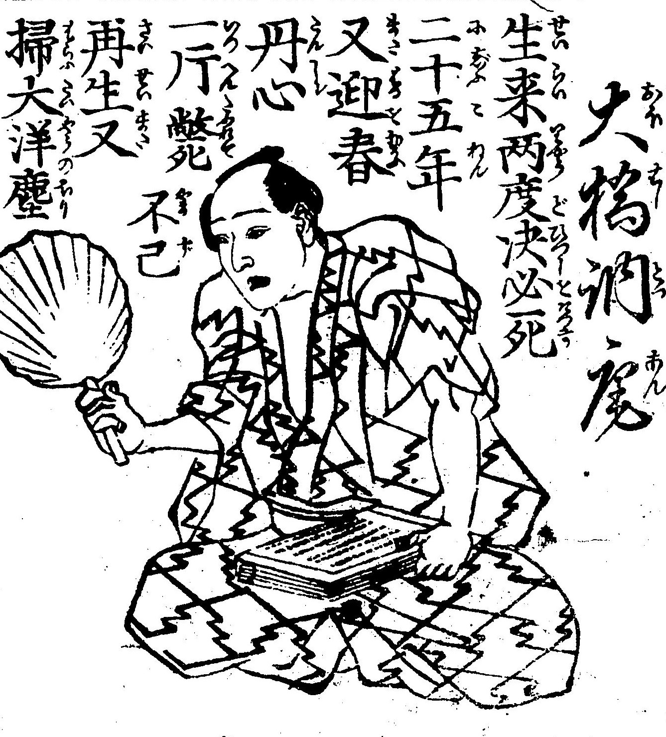 大橋訥庵の肖像。